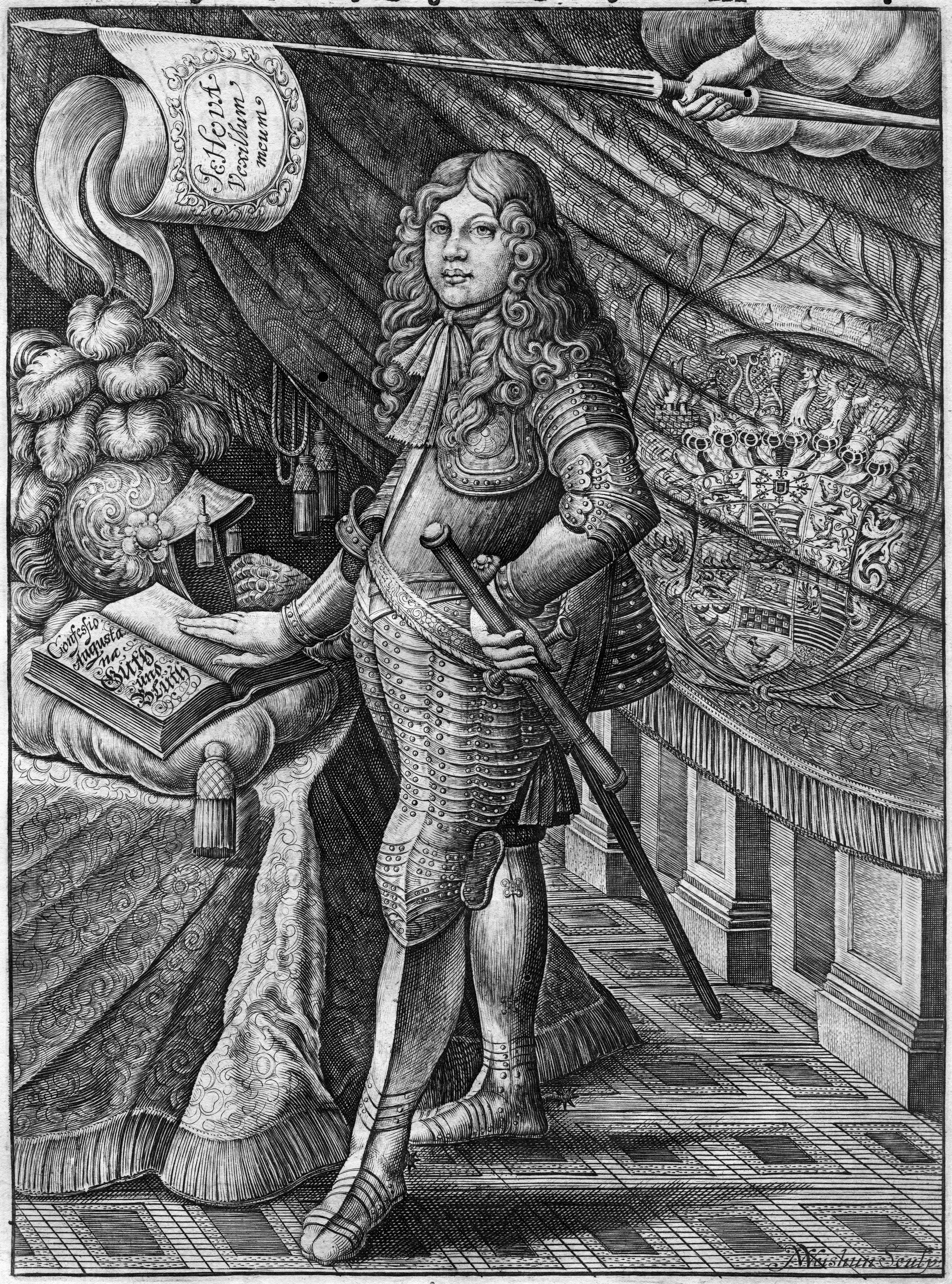 portrait gravé